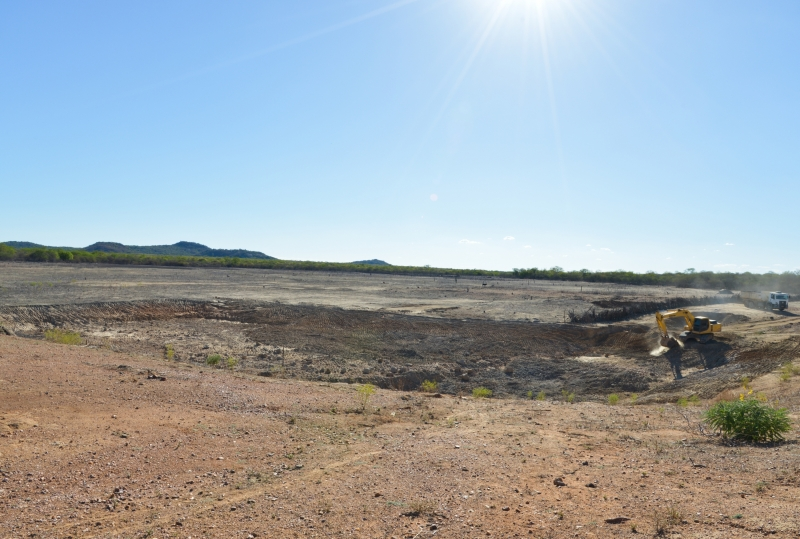 Açude vazio em Petrolina, na pior seca dos últimos 50 anos no semiárido brasileiro.